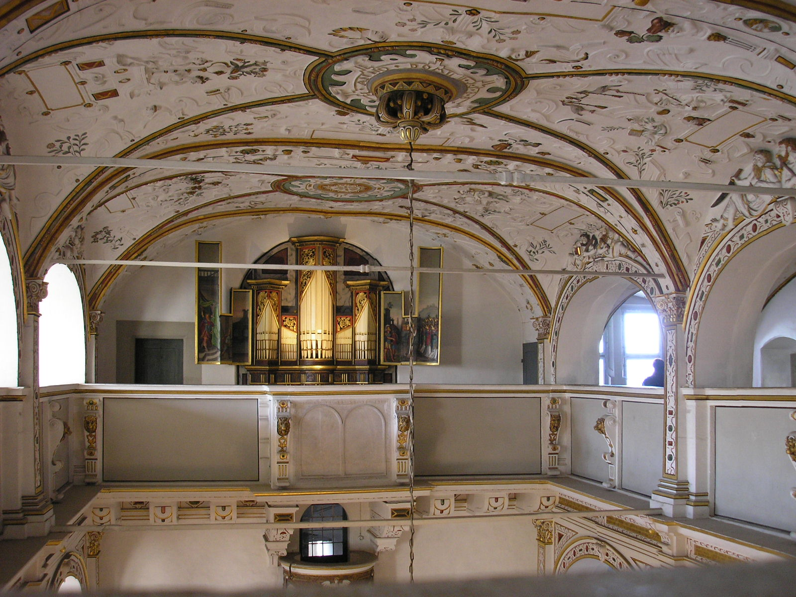 Die Decke der Renaissance-Kapelle in Schloss Wilhelmsburg in Schmalkalden (Thüringen).